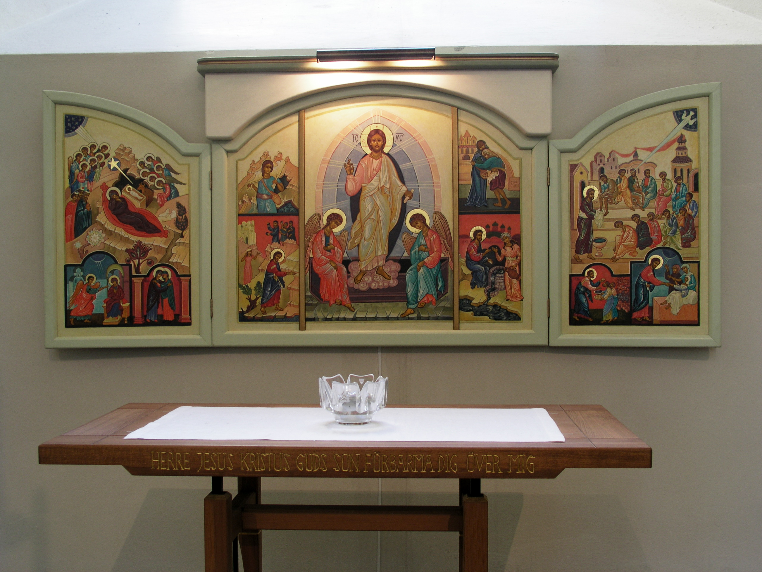 Karlstads domkyrka / Cathedral of Karlstad. Triptych.